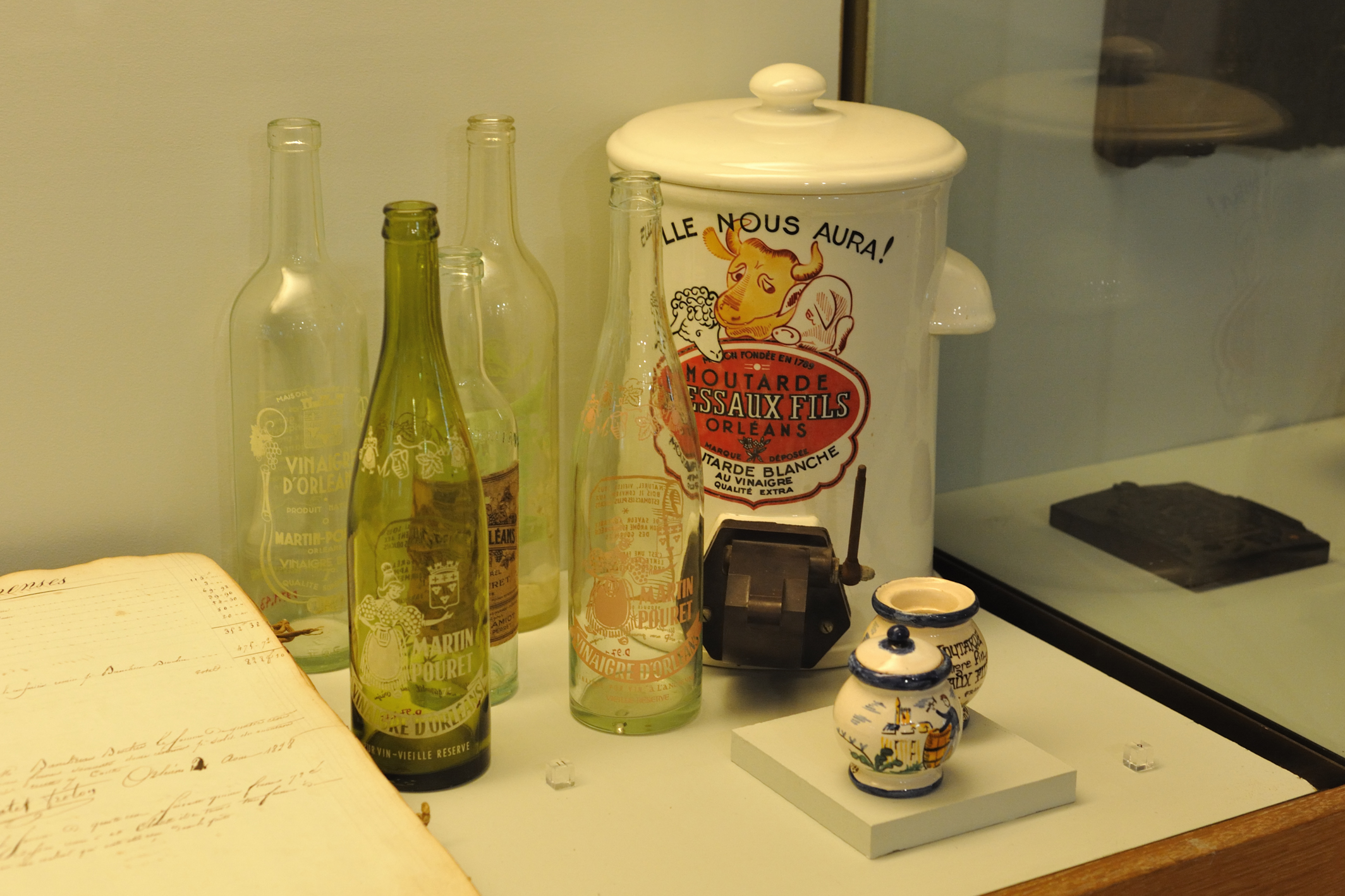 Bouteilles de vinaigre Martin Pouret et distributeur de moutarde Dessaux Fils (illustration d'Edgard Derouet) Musée historique et archéologique d'Orléans, Loiret, France